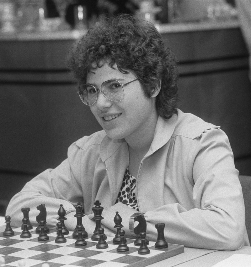 Ohra schaakfestival Amsterdam 1985; enige vrouwelijke deelneemster Susan Polgar (Hongarije).